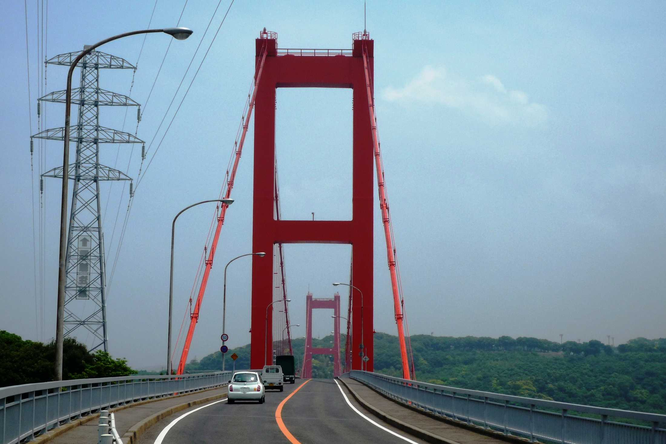 平戸大橋・正面（平戸島側より撮影）